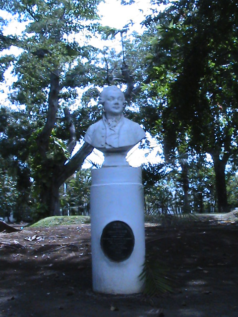 Pierre Poivre2